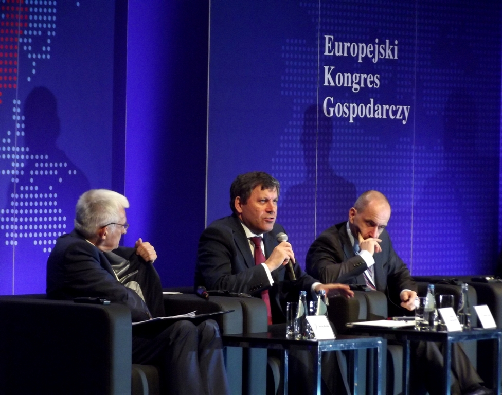 Zdjęcie zrobione podczas V Europejskiego Kongresu Gospodarczego (EEC) w Katowicach.